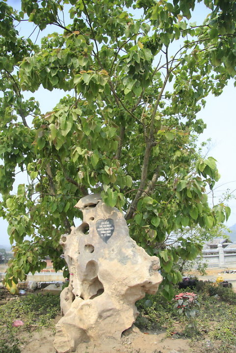 Cây bồ đề của chủ tịch nước Nguyễn Minh Triết trồng tại chùa Bái Đính khi về thăm và làm việc tại Ninh Bình